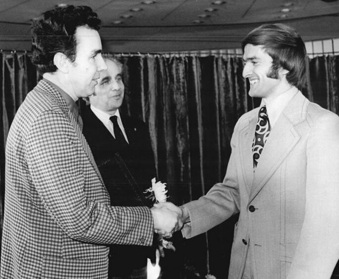 Title: Berlin, Ehrung Sportler des Jahres, Cierpinski, Raddatz, People in the image: Cierpinski, Waldemar: Marathonläufer, Olympiateilnehmer 1976 und 1980, DDR (GND 118910337) * Raddatz, Klaus: Stellvertretender Leiter der Abteilung Agitation im ZK der SED, DDR Factual corrections and alternative descriptions are encouraged separately from the original description. Additionally errors can be reported at this page to inform the Bundesarchiv. Original historic description: ADN-ZB Koard 20.12.76 Berlin: Sportler des Jahres geehrt. Marathon-Olympiasieger Waldemar Cierpinski (SC Chemie Halle-r.) erhält von Klaus Raddatz, Chefredakteur der Jugendzeitung "Junge Welt" (l.), die Ehrenschale dieser Zeitung überreicht. In der traditionellen Umfrage dieses Organs nach den Sportlern des Jahres hatte er mit 34.2104 Stimmen bei den Männern den ersten Platz belegt. Im Palast der Republik wurden am 20.12. die besten Sportler des Olympiajahres 1976 geehrt. Mitte, halb verdeckt: Hans-Richard Vollbrecht, Leiter der Sportredaktion der "Junge Welt".